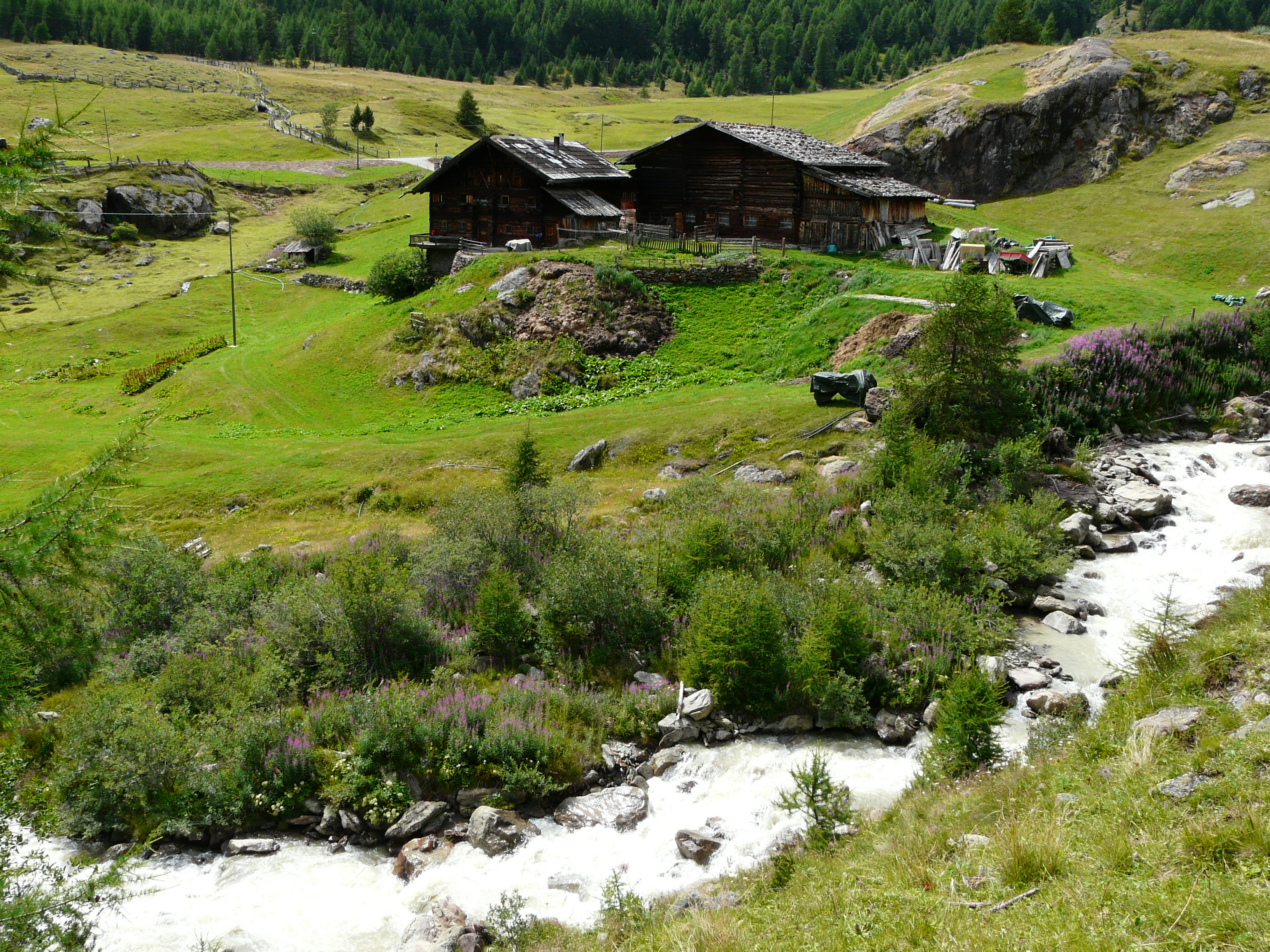 Schnalser Bach mit Köflhöfen